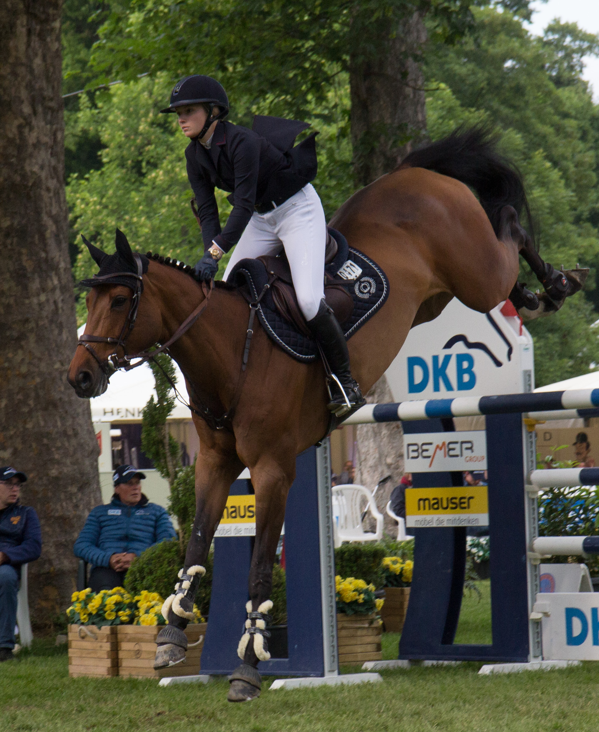 Internationales Wiesbadener Pfingstturnier 2018. CSI 4* Springprüfung KI.S *** m. Stechen (1,50m) "Preis des Hessischen Ministerpräsidenten": Lillie Keenan auf Chacolette